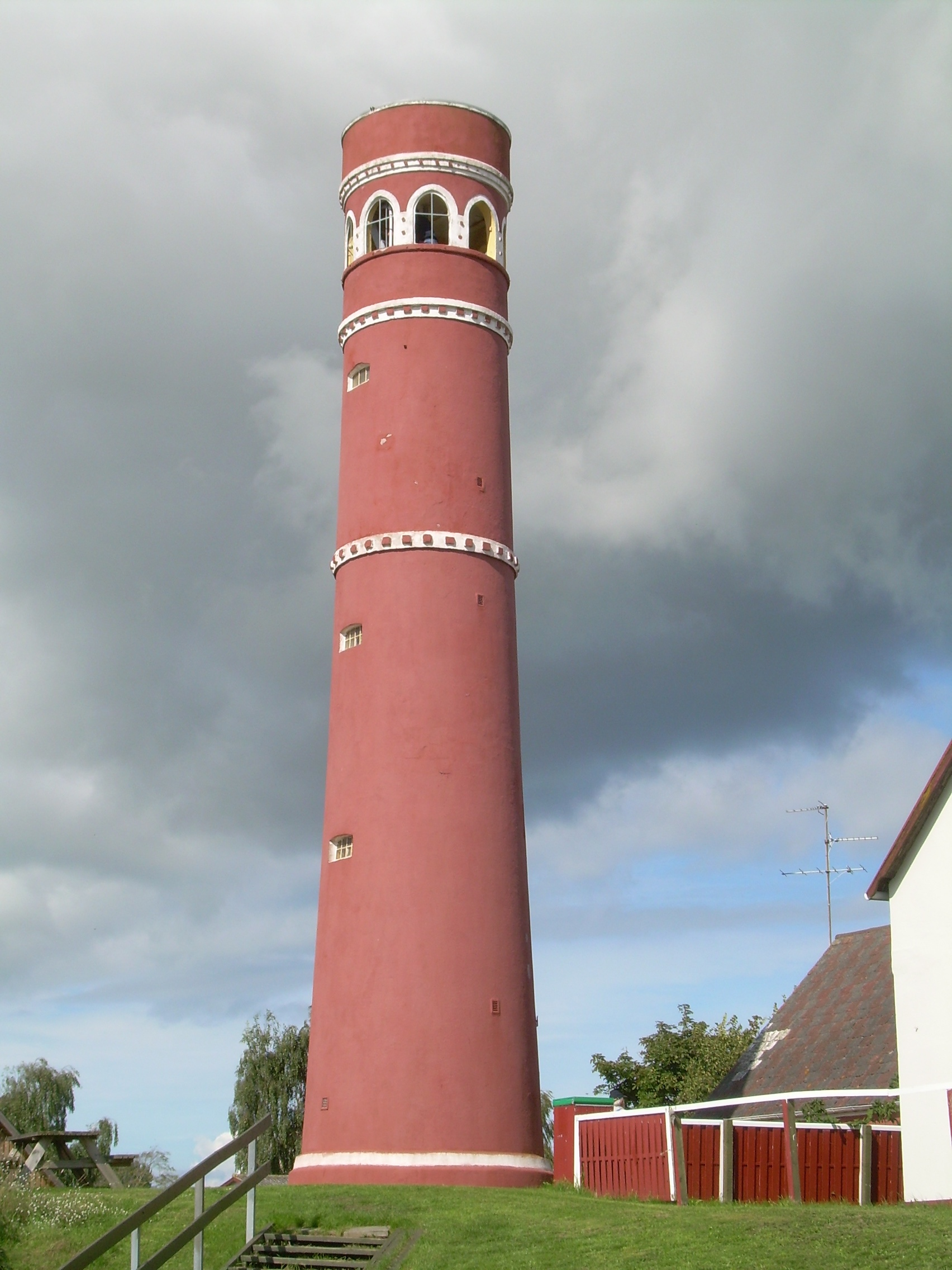 Læsø Tower, build by Thorvald Hansen